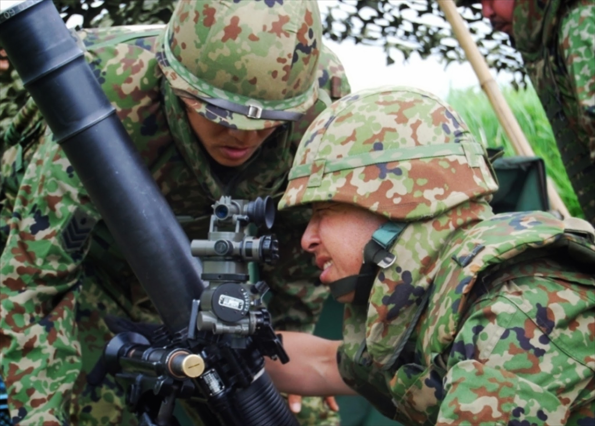 Title 25.05.31~06.02 ２４ｉ・第５次即応予備自衛官招集訓練（第１次野営）(25,6,2受信・請関２曹)24普連 81ミリ迫撃砲縮射弾射撃(1).JPG Album 教育訓練等 即応予備自衛官招集訓練・８１ｍｍ迫撃砲射撃（第２４普通科連隊・えびの）